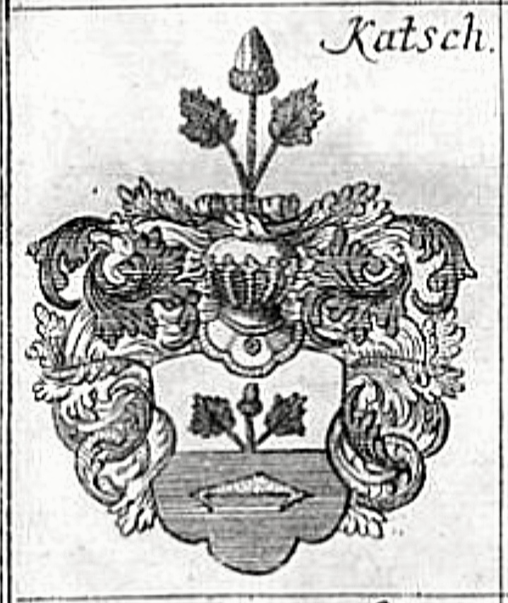 Wappen des Hallenser Pfännergeschlechts Katsch.